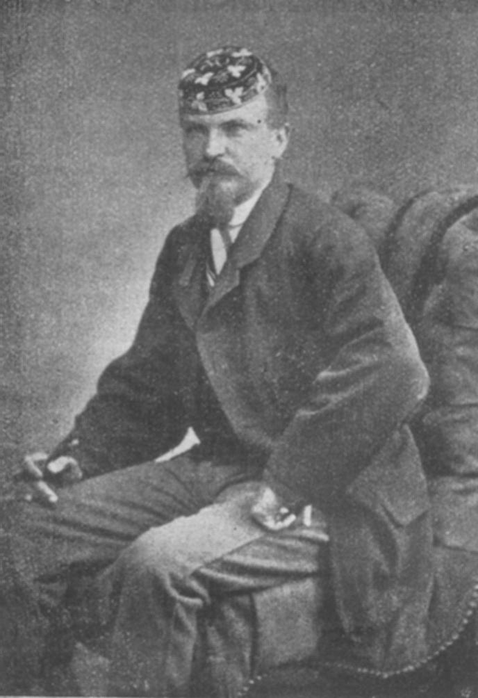 Fotografie von Emil Guntermann als Corpsbursche der Moldavia I zu Prag